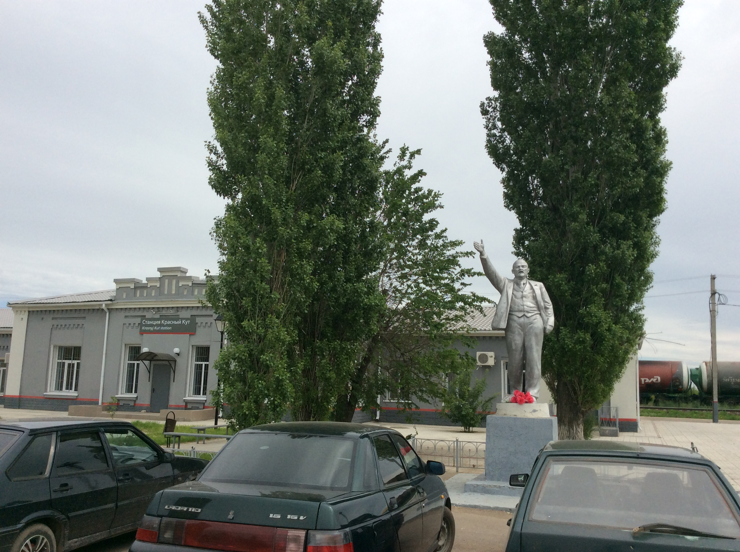 Железнодорожный вокзал, памятник Ленину